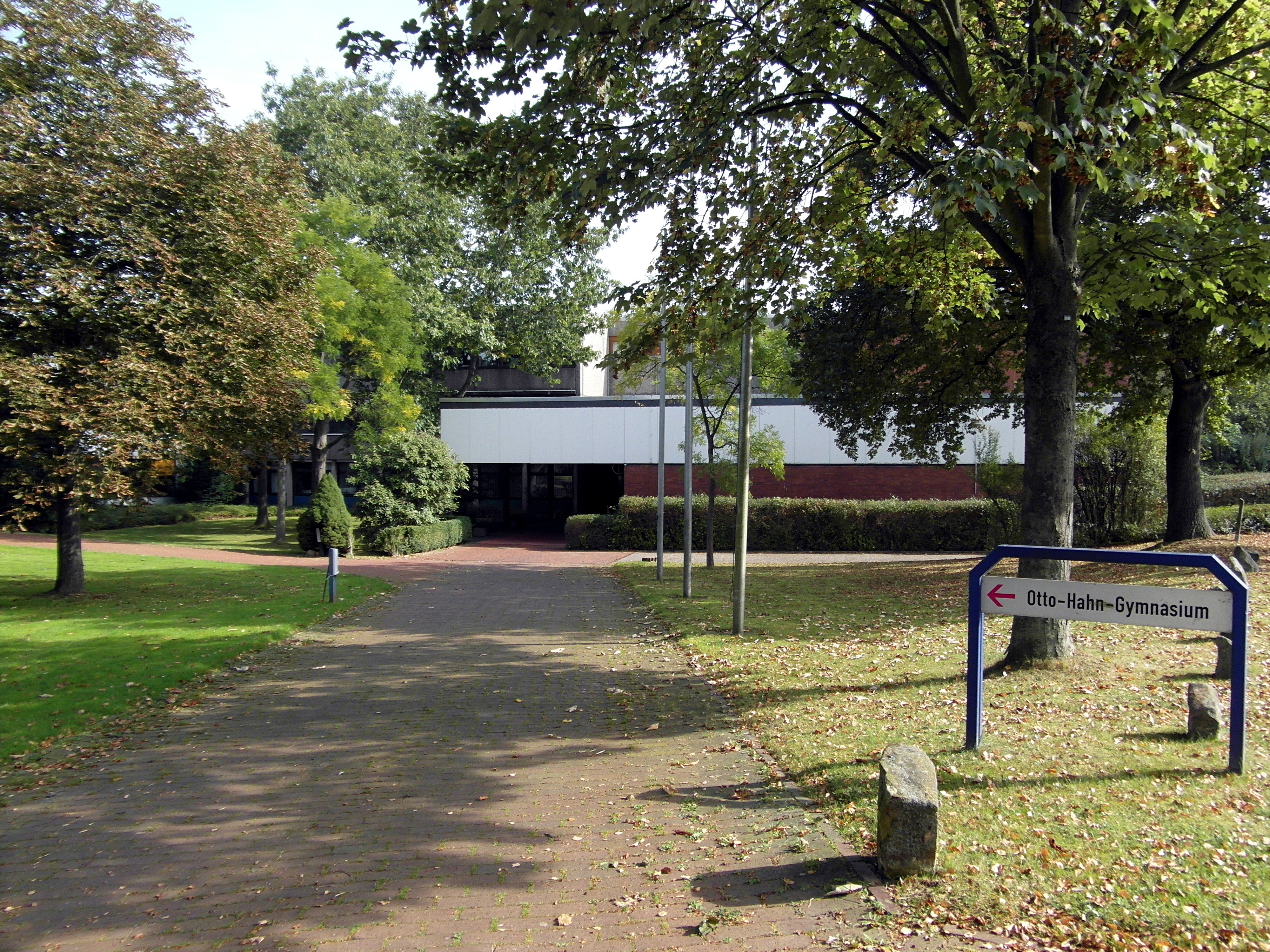 Eingang zum Otto-Hahn-Gymnasium in Springe in der Region Hannover in Niedersachsen